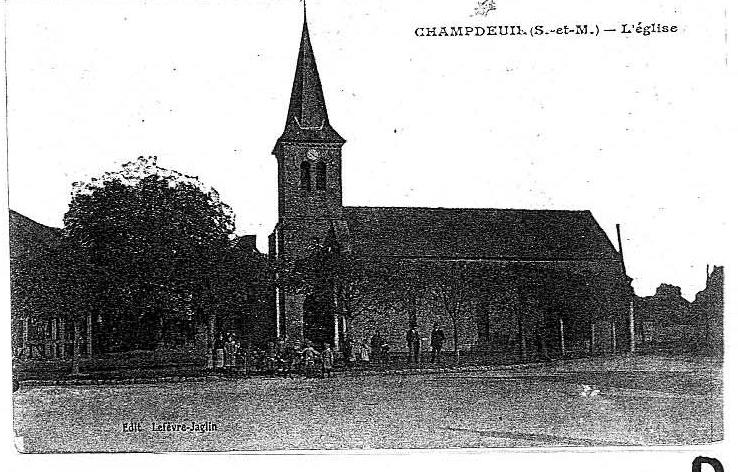 Eglise de champdeuil